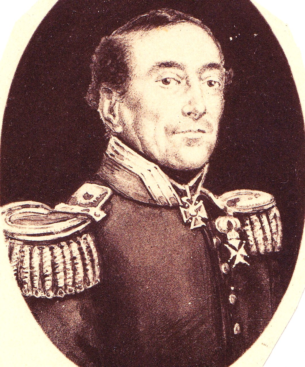 Joannes Vertholen